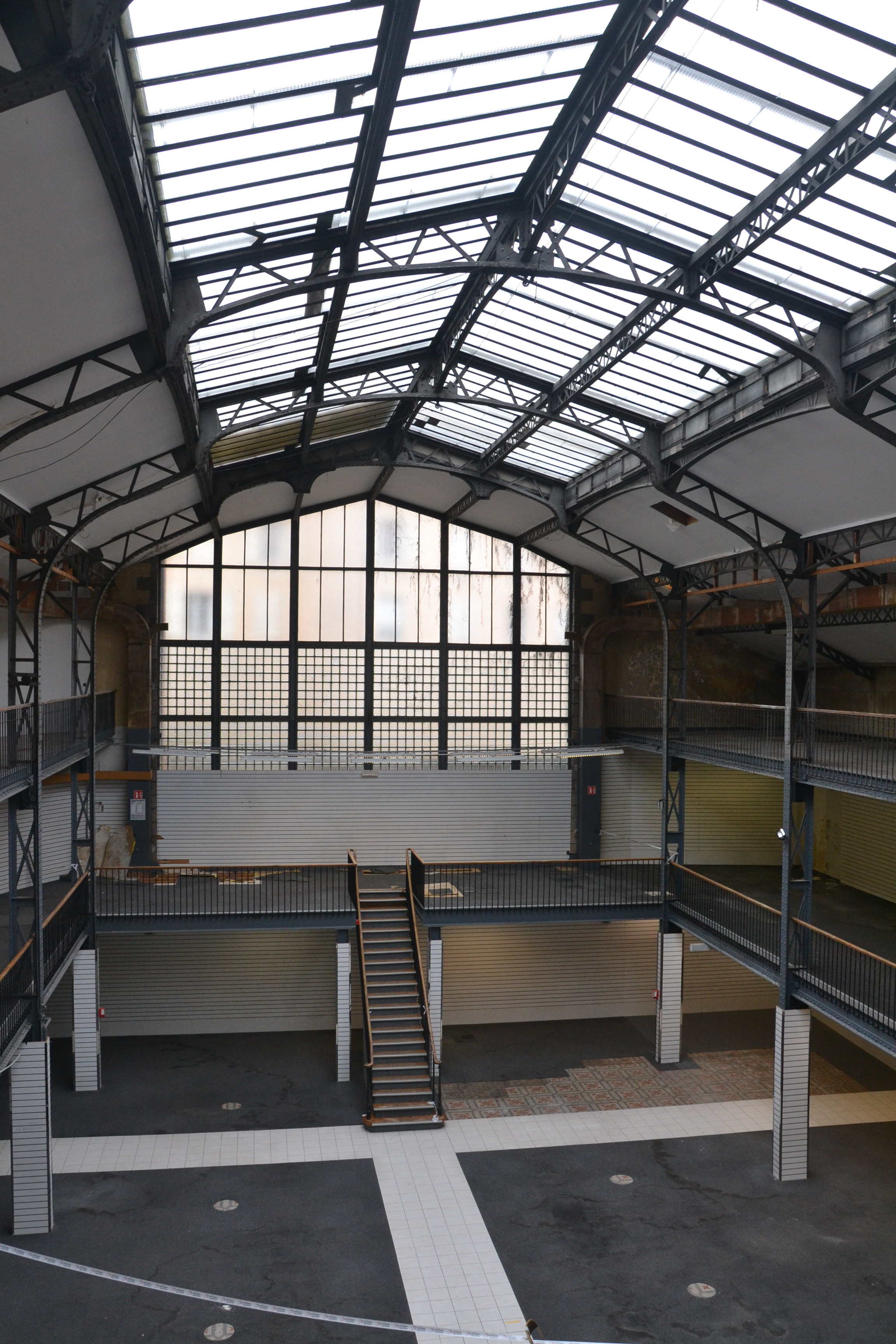 Ancienne imprimerie puis bâtiment commercial, devant accueillir le FRAC-Artothèque Limousin en 2020.